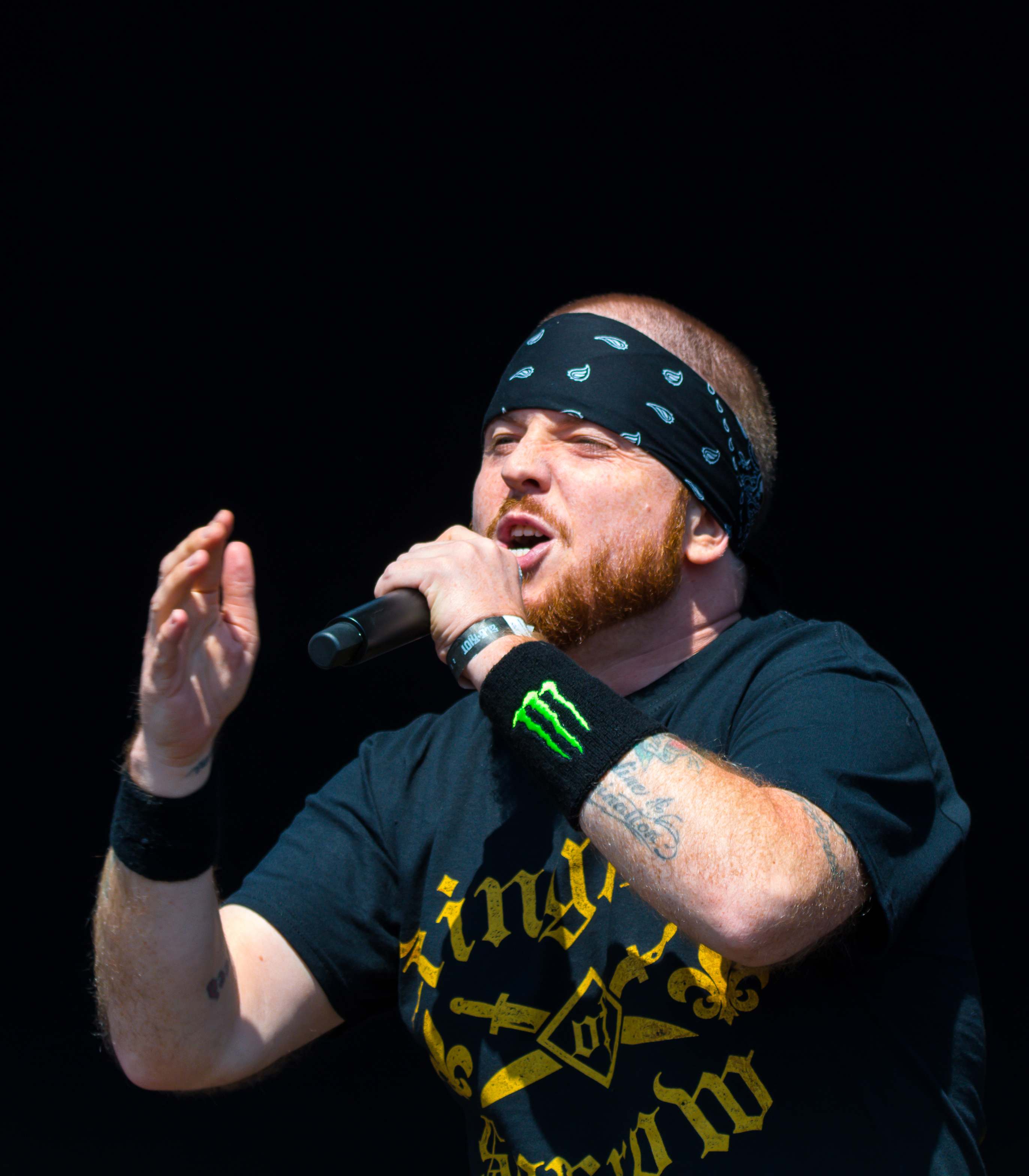 Jasta beim Elbriot 2018